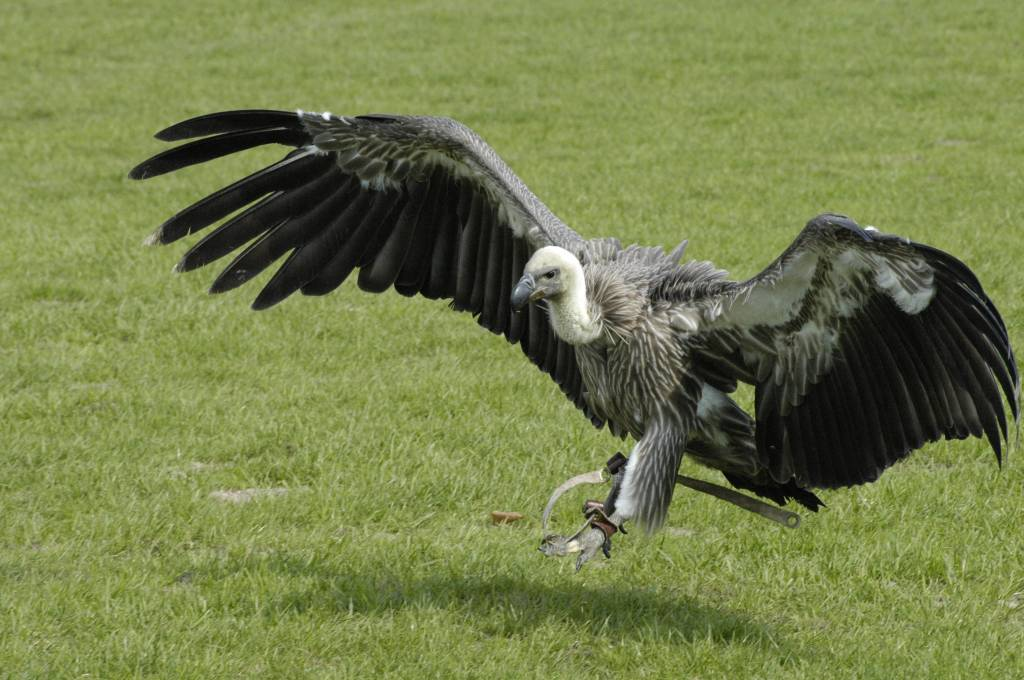 Beschreibung und Quelle Bildbeschreibung: Zahmer junger Gänsegeier aus Falknerei-Vorführung Quelle: selbst gemachte Aufnahme Photograph: Philipp Oelwein Datum: 27. August 2005, Hamburg